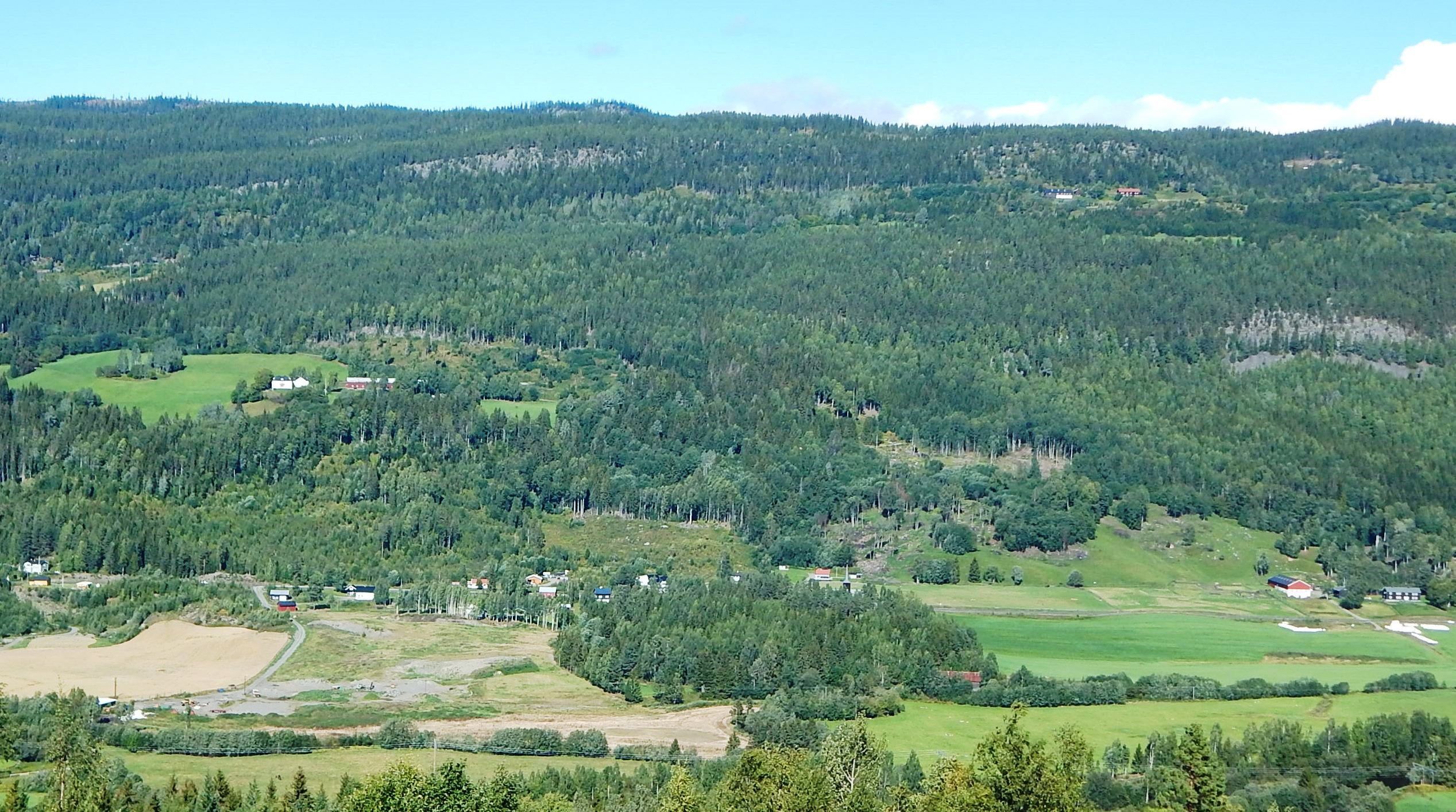 Nordsinni sett fra Åslibygda